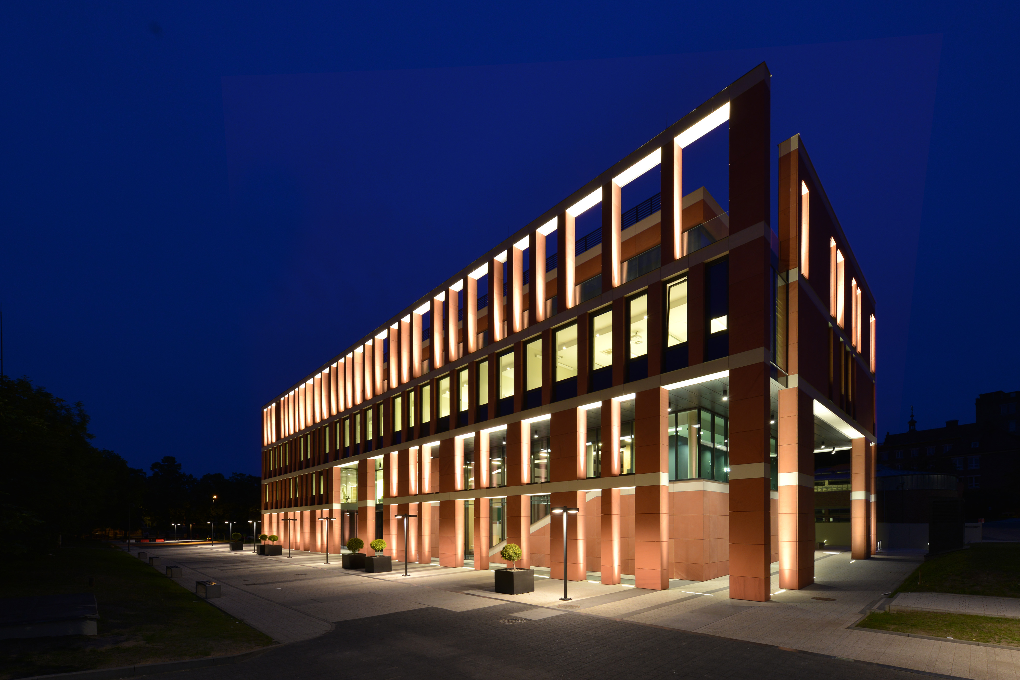 Budynek Nanotechnologii B Politechniki Gdańskiej.